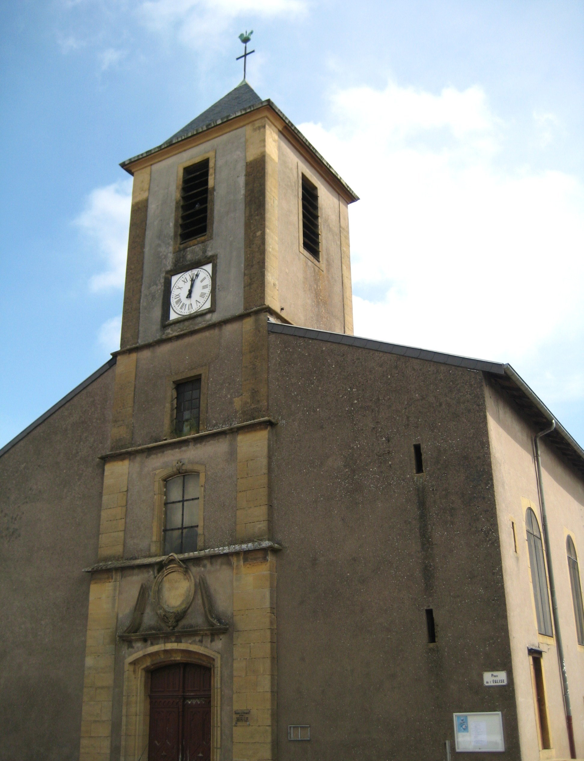 Église Saint-Clément à Marange, France